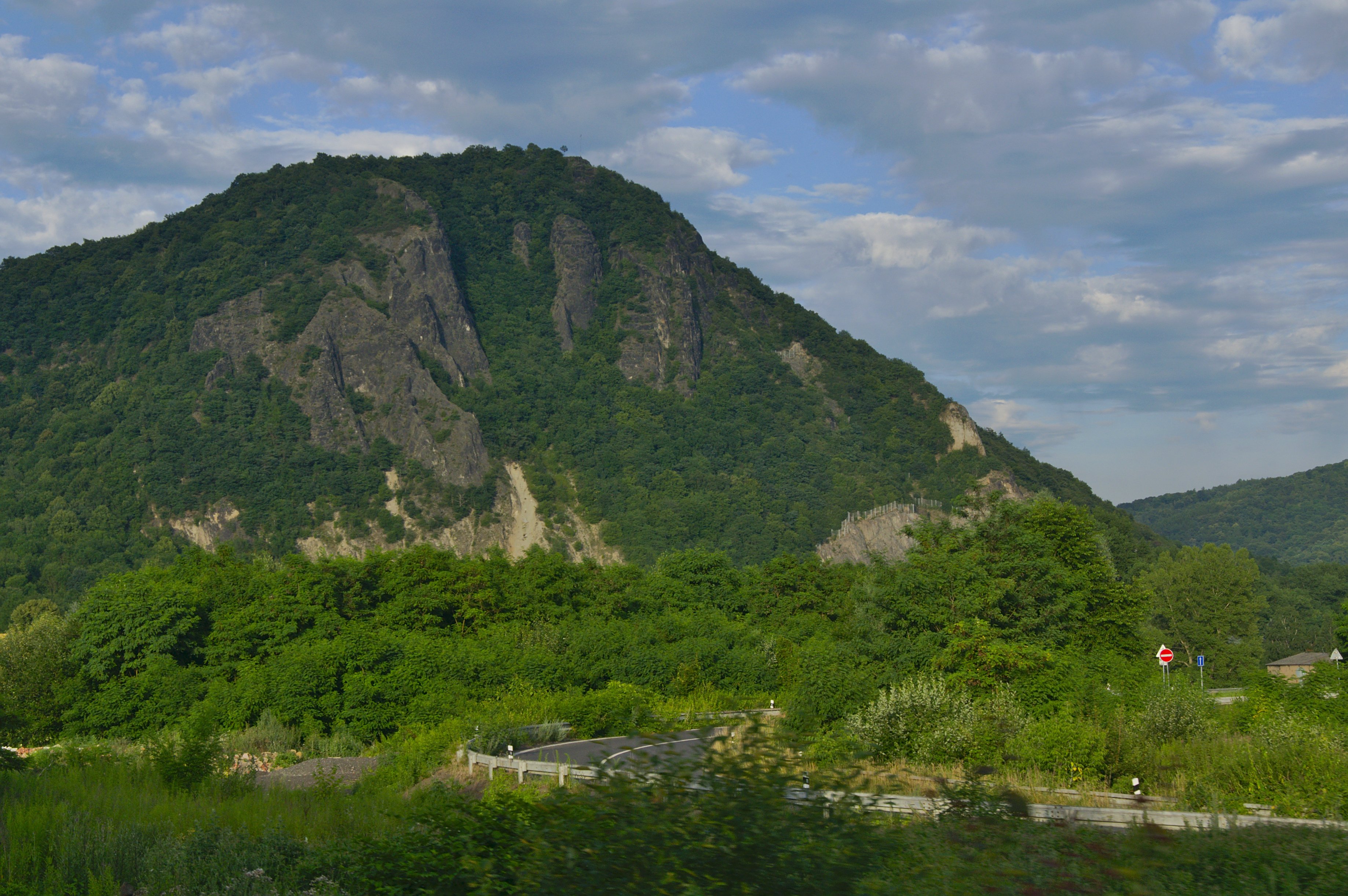 Přírodní rezervace Kozí vrch, okres Ústí nad Labem